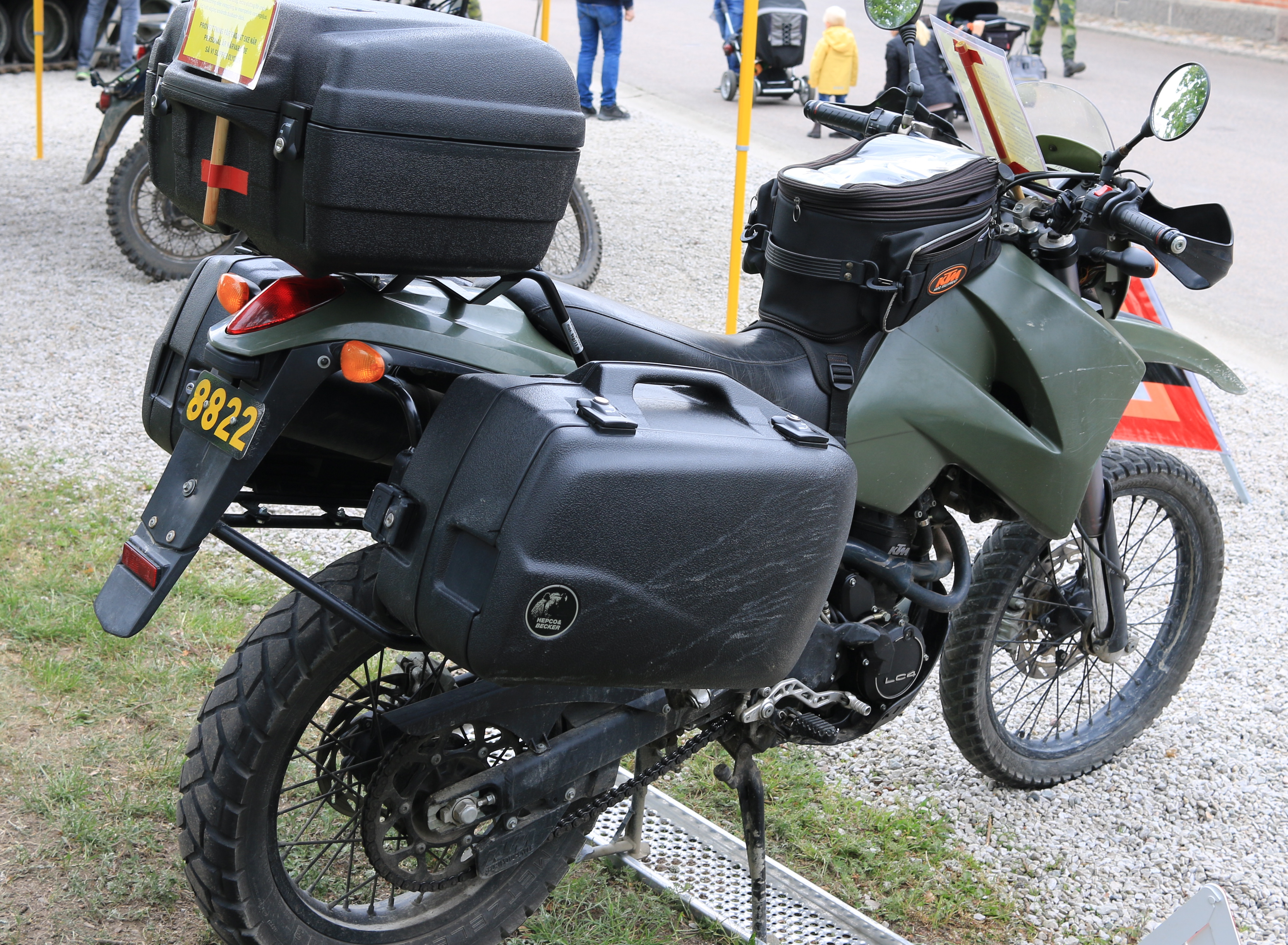 Motorcykel 409 Revinge 2019